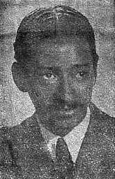 Oscar Alemán, destacado guitarrista de jazz afroargentino.